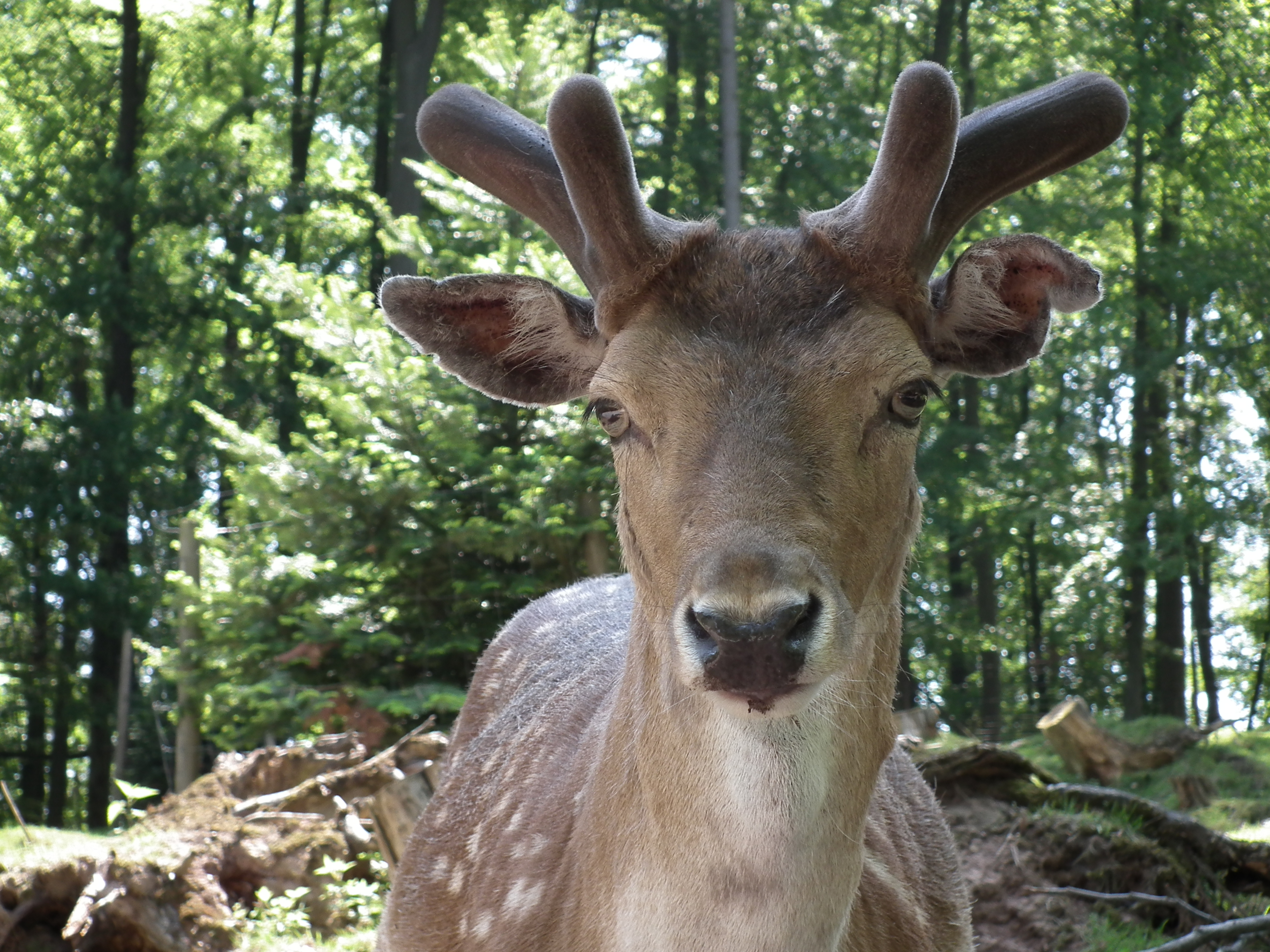 Portrait eines Damhirschs (Dama dama) im Wildpark Tripsdrill (Baden-Württemberg, Deutschland)